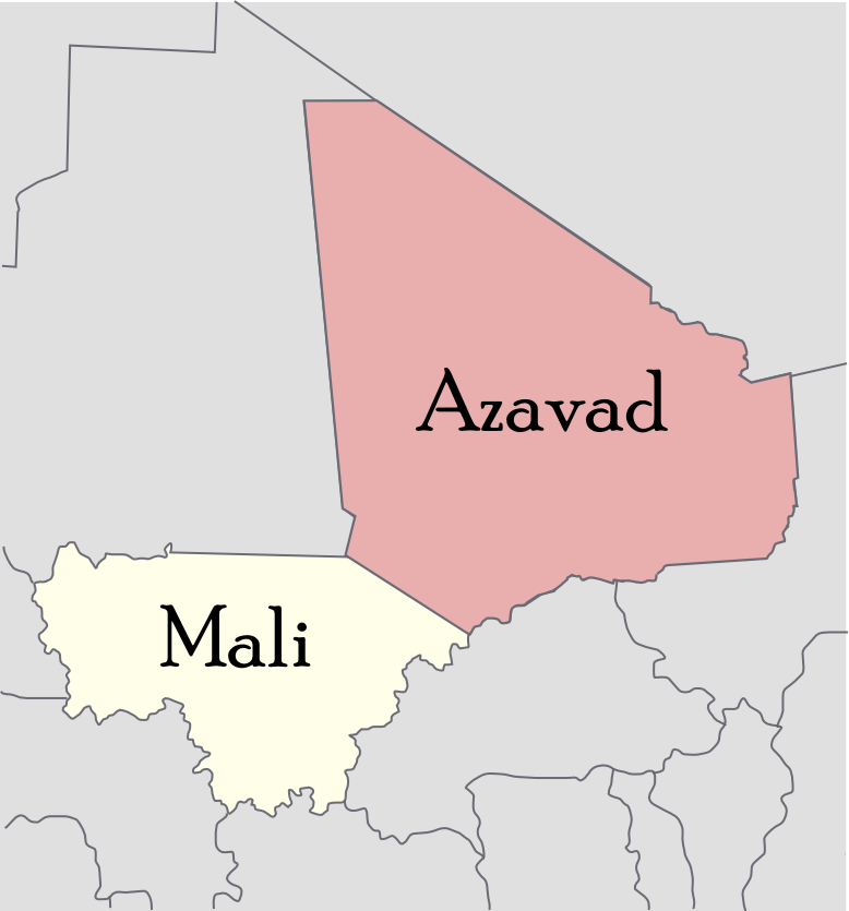 Rozsah Azavadu v hranicích Mali.